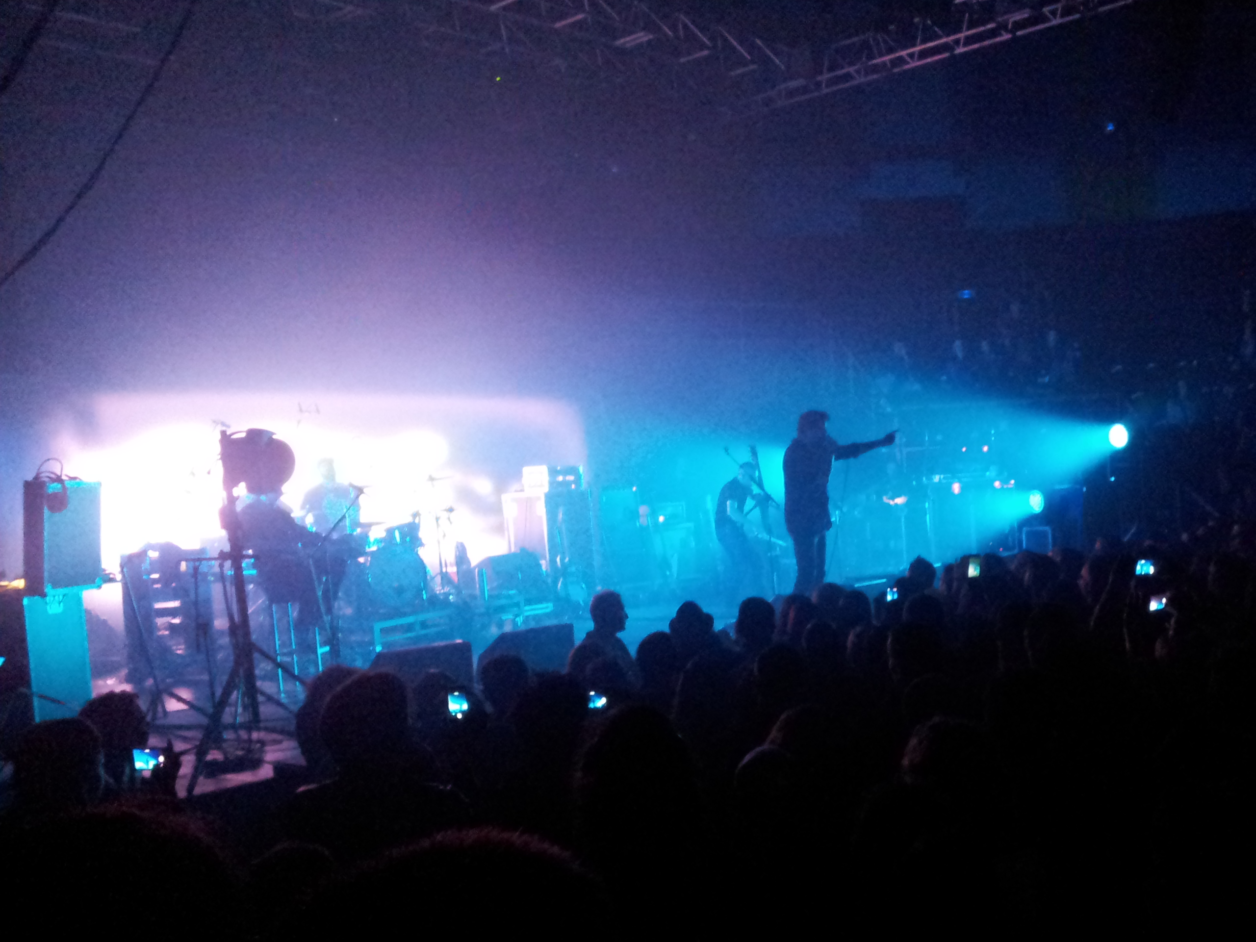 Concert de Detroit au Cirque Jules-Verne à Amiens en mai 2014.